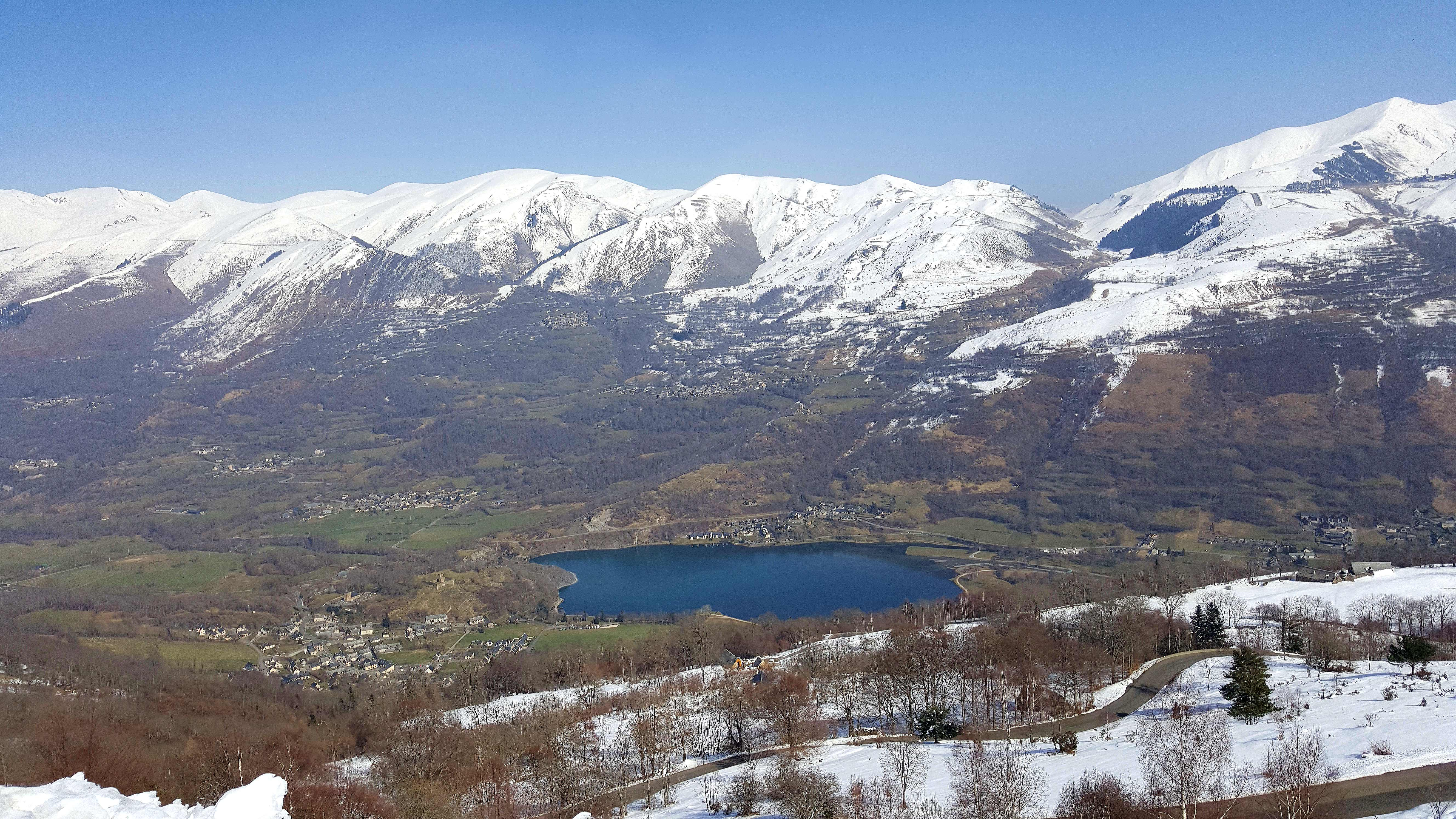 Vue magnifique sur la vallée du Louron, le lac de Génos, et le massif du Peyresourde.